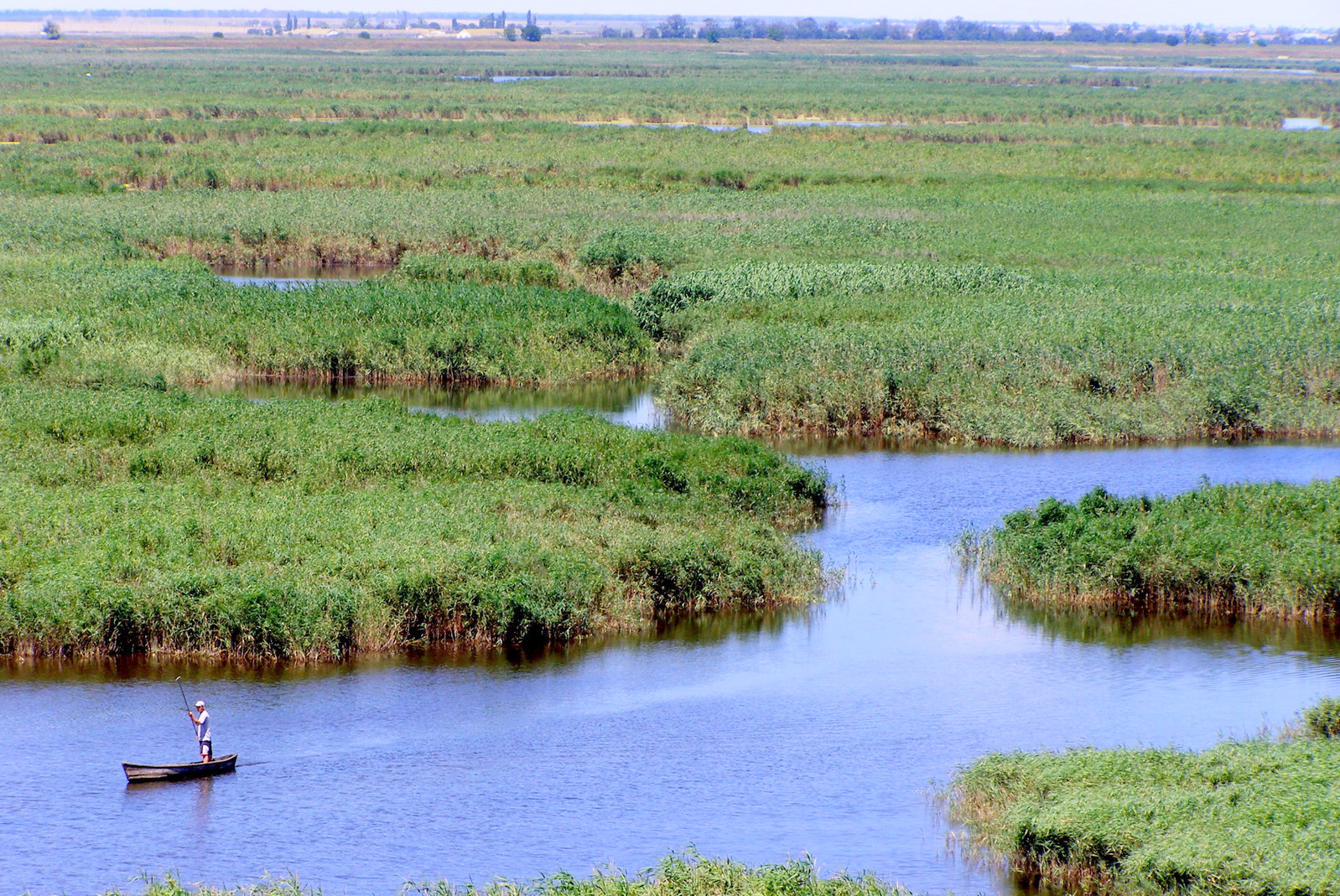 Дунайський біосферний заповідник, Кілійський р-н, м. Вилкове, вул. Татарбунарського повстання, 132 а